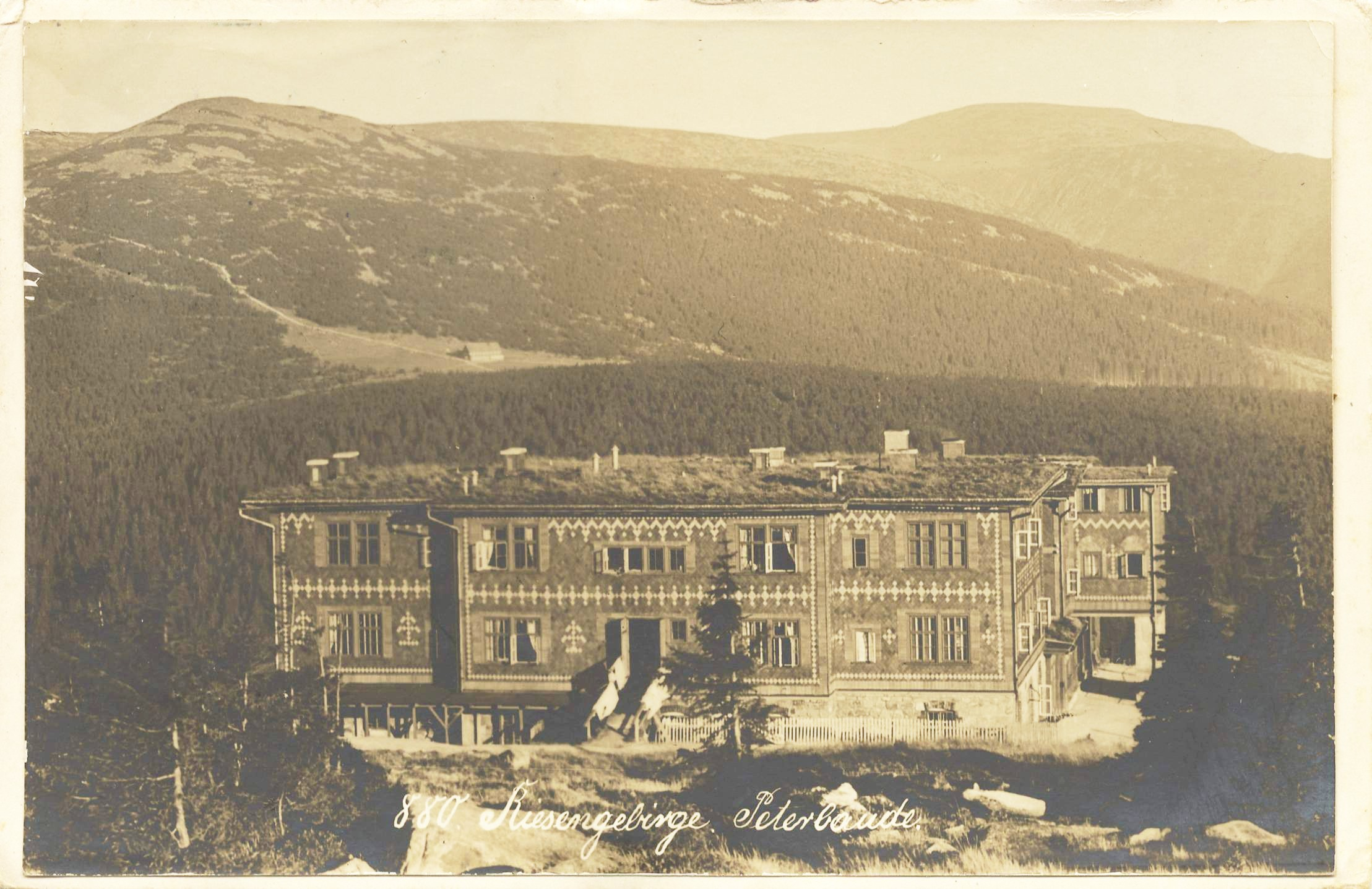 Petrova bouda (Krkonoše) do roku 1911